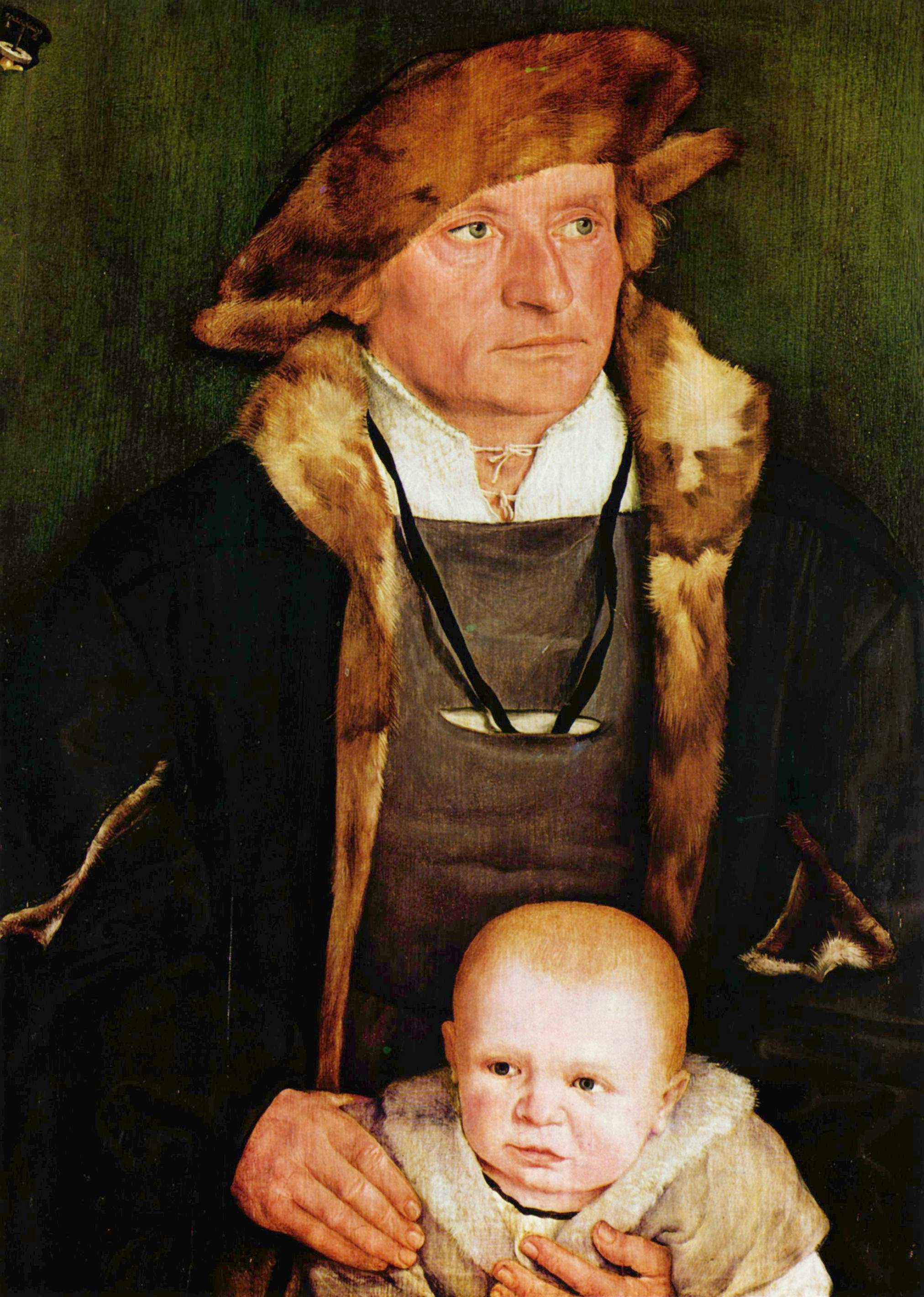 Gegenstück in Philadelphia mit der Gemahlin Urmillers mit einer Tochter zeigt. Der erwartungsfrohe Ausdruck der Tochter steht im Gegensatz zur abgewandten Haltung des Jungen und dem sorgenvollen Blick des Vaters in Frankfurt. Mit der Einbeziehung der Kinder entstand ein psychologisches Familienbildnis im Gegensatz zum typischen Allianzbildnis des Spätmittelalters.